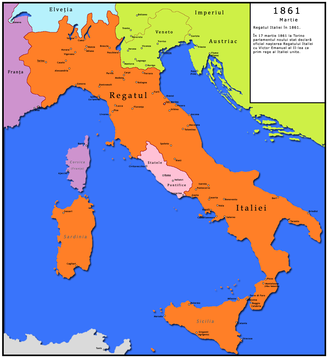 1861: În 17 martie 1861 la Torino parlamentul noului stat declară oficial nașterea Regatului Italiei cu Victor Emanuel al II-lea ca prim rege al noului regat unificat. Regiunea Lazio rămâne sub controlul Papei, dar regiunea Veneto sub control austriac.